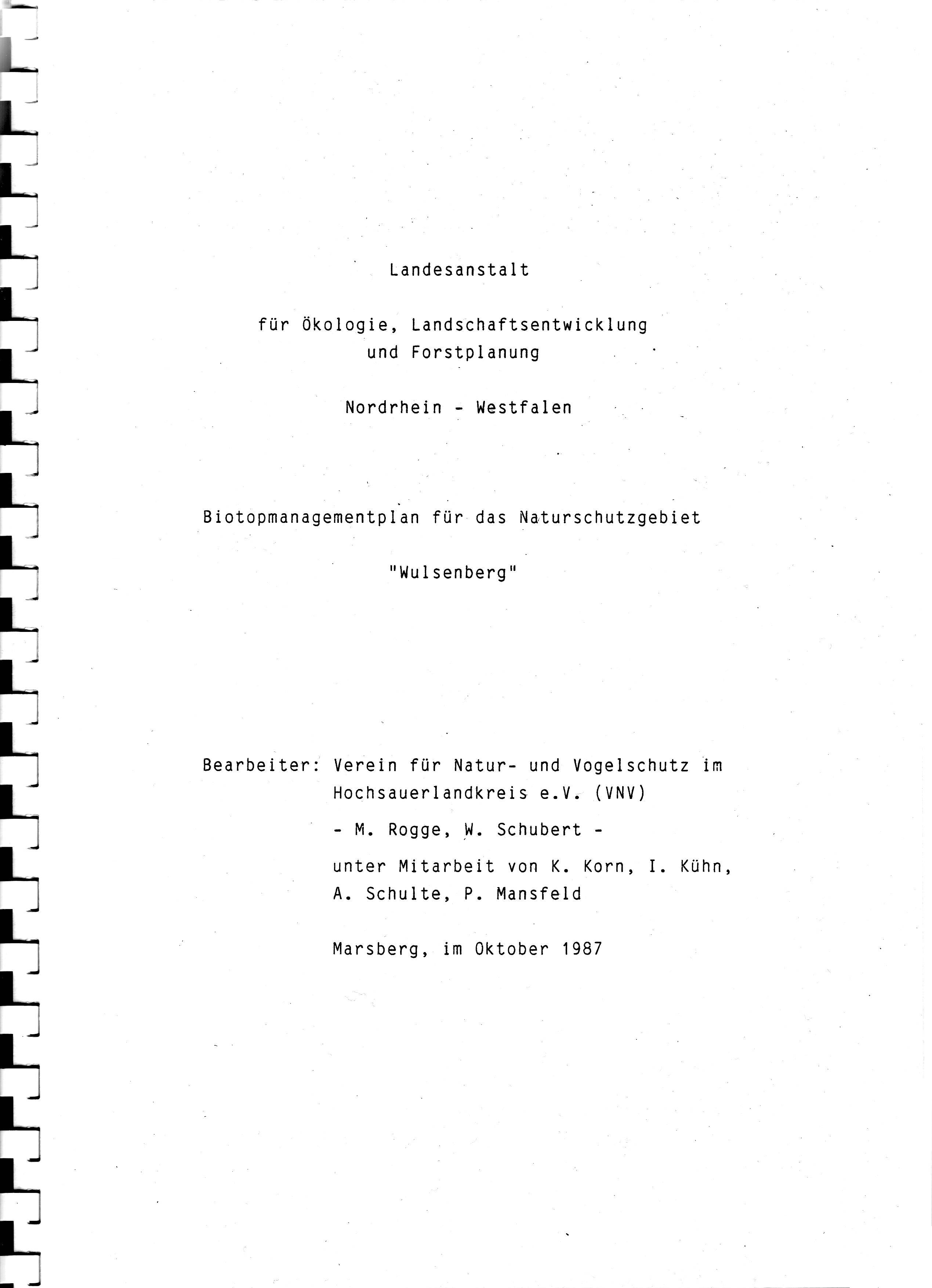 Titelseite Biotopmanagementplan Wulsenberg